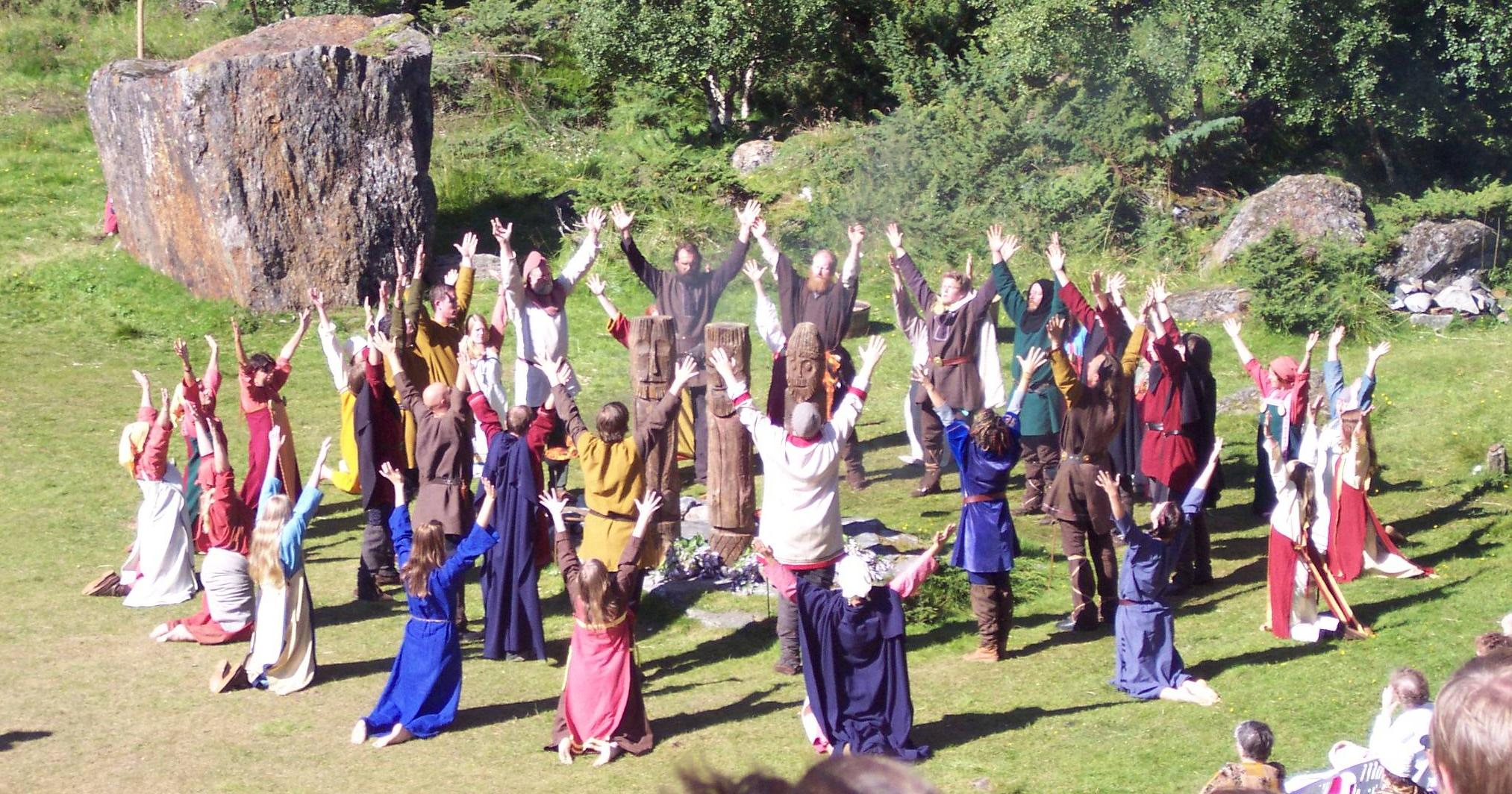 Bilde fra Steigen Sagaspill 2005 Midt i offerdansen i offerscenen. Bilde tatt av Mari Perdersen med Bruker:ThorRune's kamera.